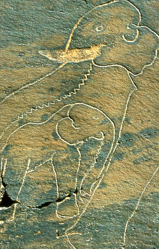 Gravure préhistorique du sud-oranais (Algérie)